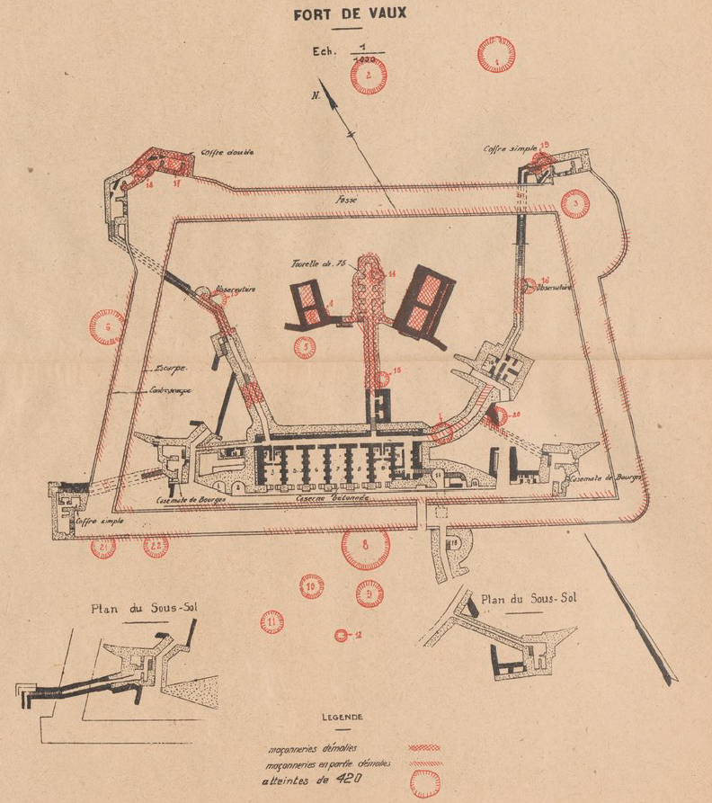 Plan du fort de Vaux avec les principaux impacts d'obus (ceux de gros calibre) reçus en 1916.